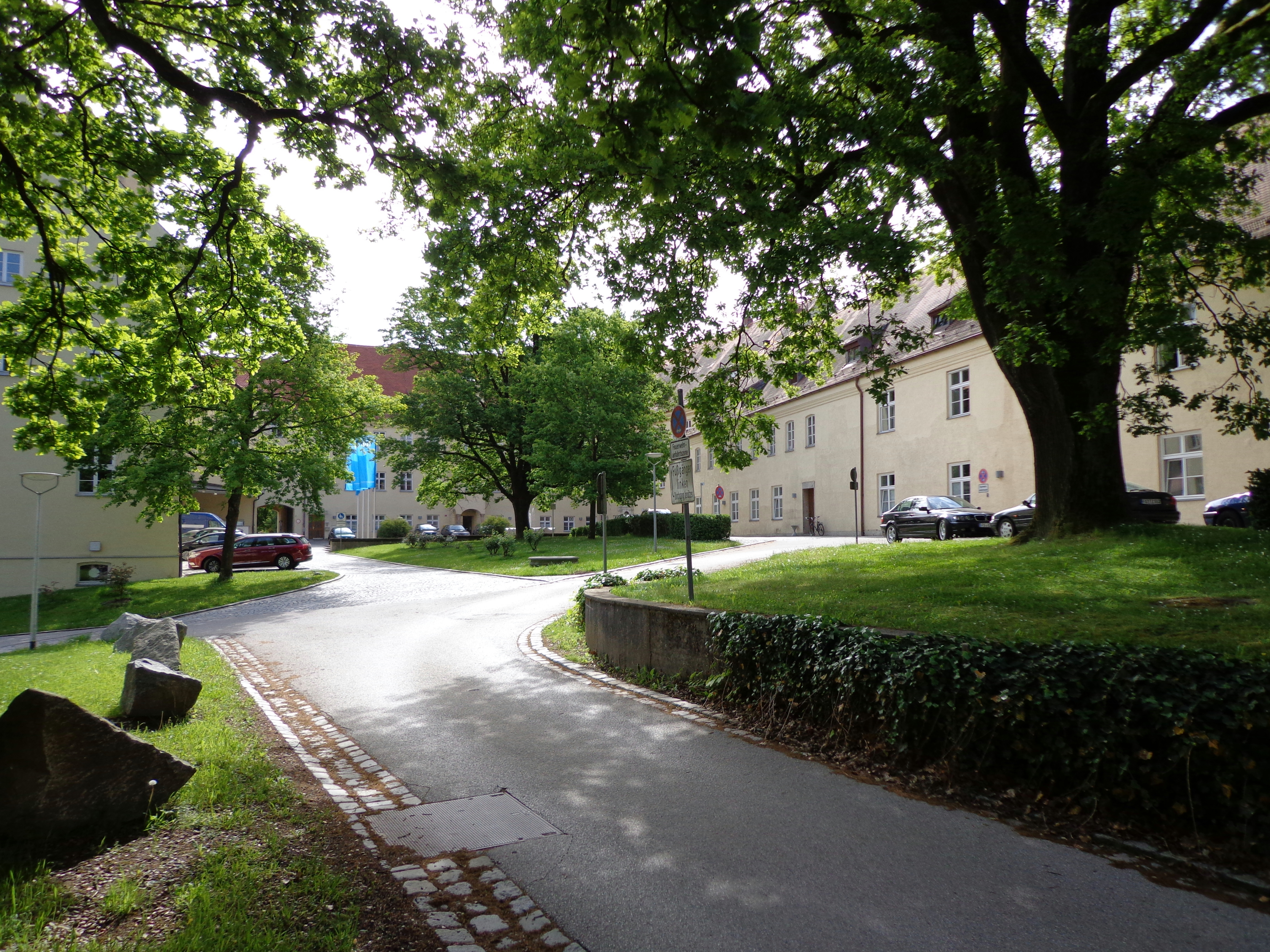 Blick auf die alten Klostergebäude Weihenstephan, die heute als Alte Akademie Sitz der Verwaltung sind. Sie besitzen noch einen Barocksaal.